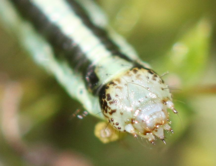 Raupe des Braunbinden-Blattspanner (Catarhoe cuculata) am 7.10.2016 in der Schwetzinger Hardt